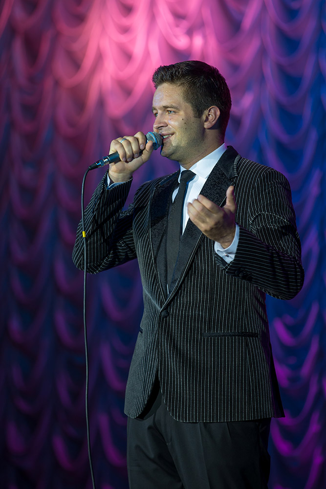 Сергей Валерьевич Волчков - победитель второго сезона музыкального шоу «Голос» на Первом канале